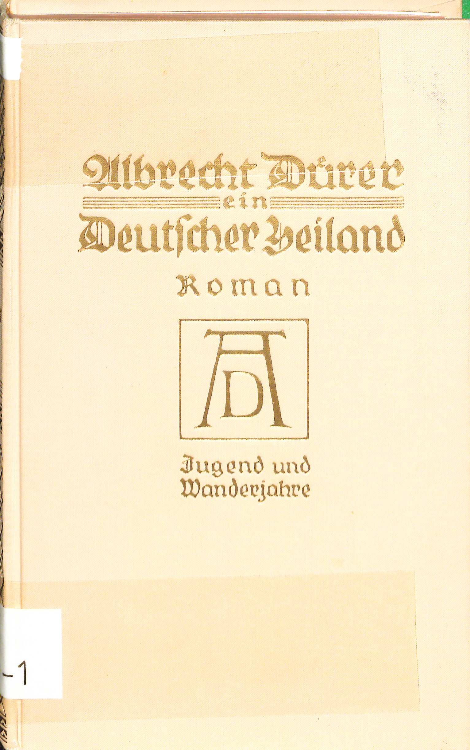 Buchumschlag zu Hermann Clemens Kosel Albrecht Dürer : Ein deutscher Heiland. Roman aus Nürnbergs Blütezeit. Roman in drei Teilen. Berlin : Bong, 1924